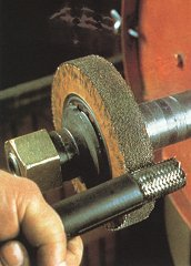 Abisolieren mit einer in kunststoff gebundenen Bürste